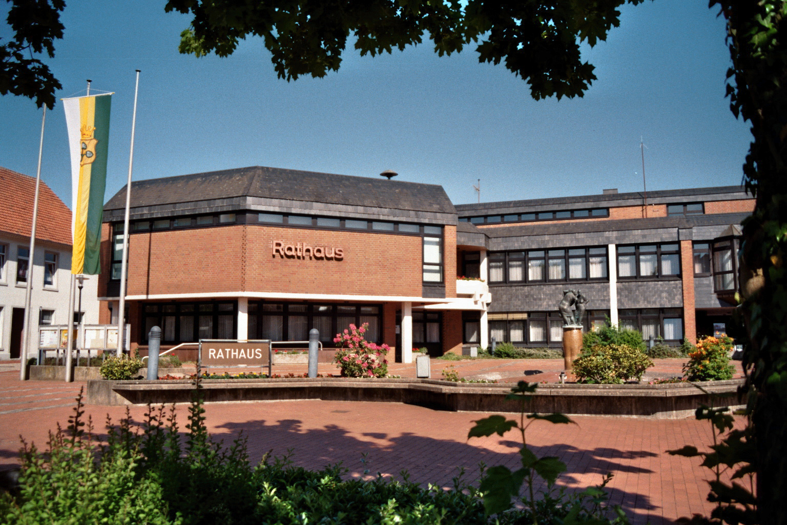 Rathaus Freren mit Brunnenanlage (r.), Landkreis Emsland, Niedersachsen.